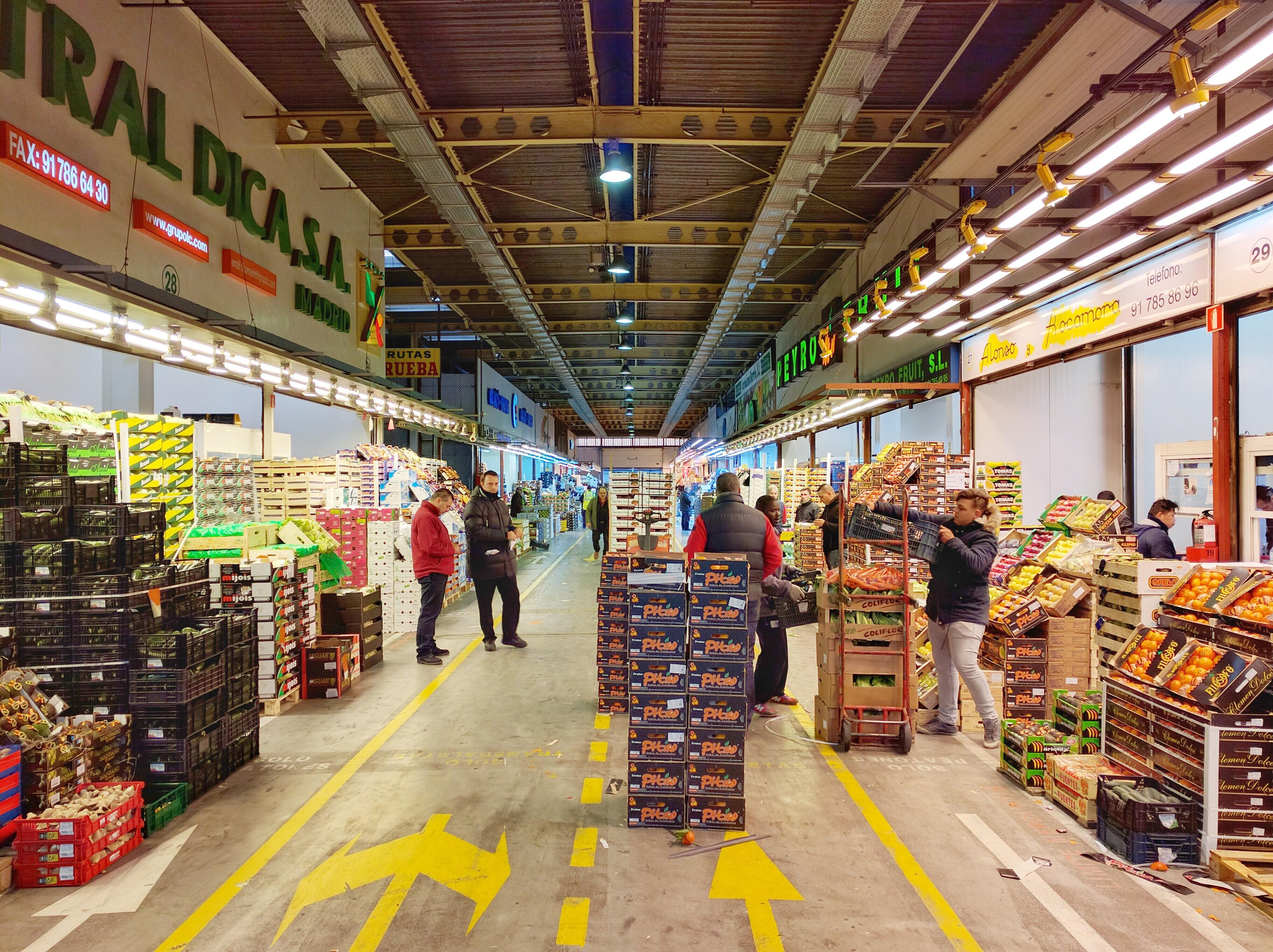 Diciembre es un mes de importante actividad comercial en Mercamadrid ya que ofrece productos frescos y de calidad para los menús de estas fiestas navideñas que se disfrutan en las mesas de las familias españolas. Con la celebración de la Nochevieja la uva toma el protagonismo en las cenas de fin de año. Así, se espera terminar diciembre con la comercialización de cerca de 5.000.000 de kilogramos de uva, cifra similar a la del año anterior.